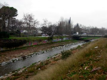 El Riu Sec al seu pas per Cerdanyola